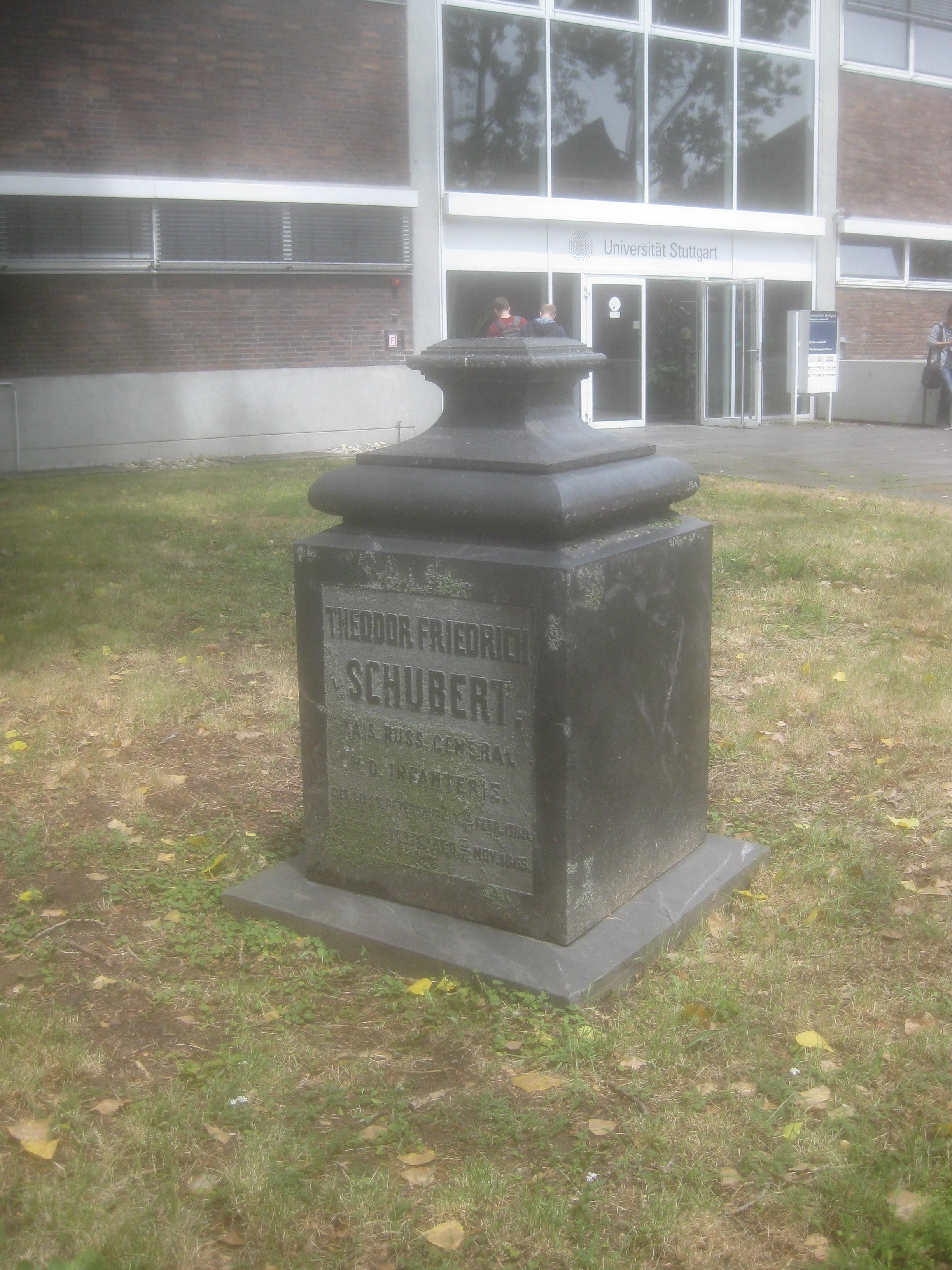 Stuttgart, Hoppenlaufriedhof, Grabmal von Theodor Friedrich Schubert. Das Grab befindet sich heute außerhalb Friedhofsmauern auf einer Rasenfläche vor dem Eingang des Gebäudes des Instituts für Umformtechnik und des Instituts für Werkzeugmaschinen, Holzgartenstraße 17, 48°46′56″N 9°10′05″E / 48.782152°N 9.168089°E.